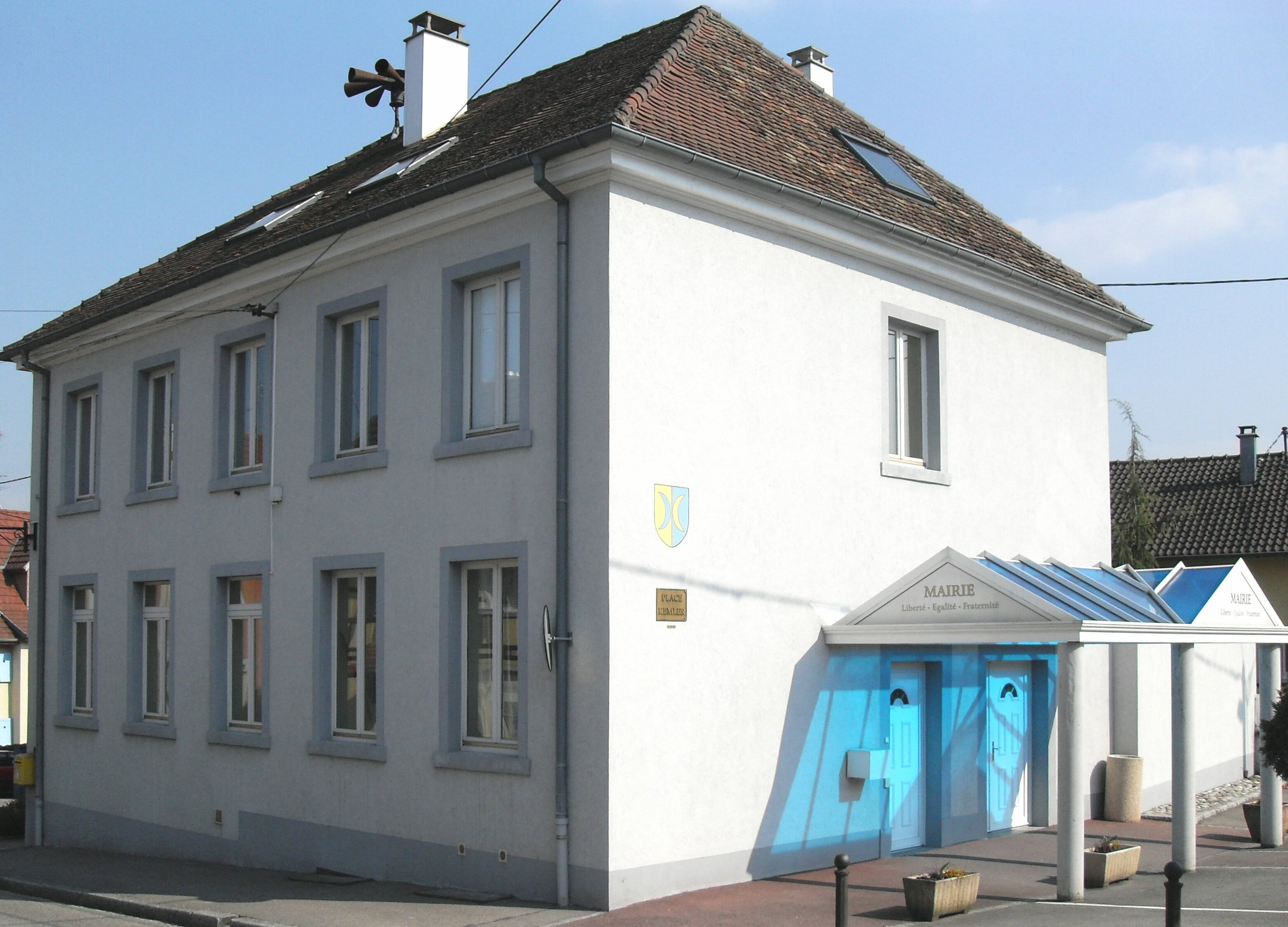 La mairie de Waltenheim